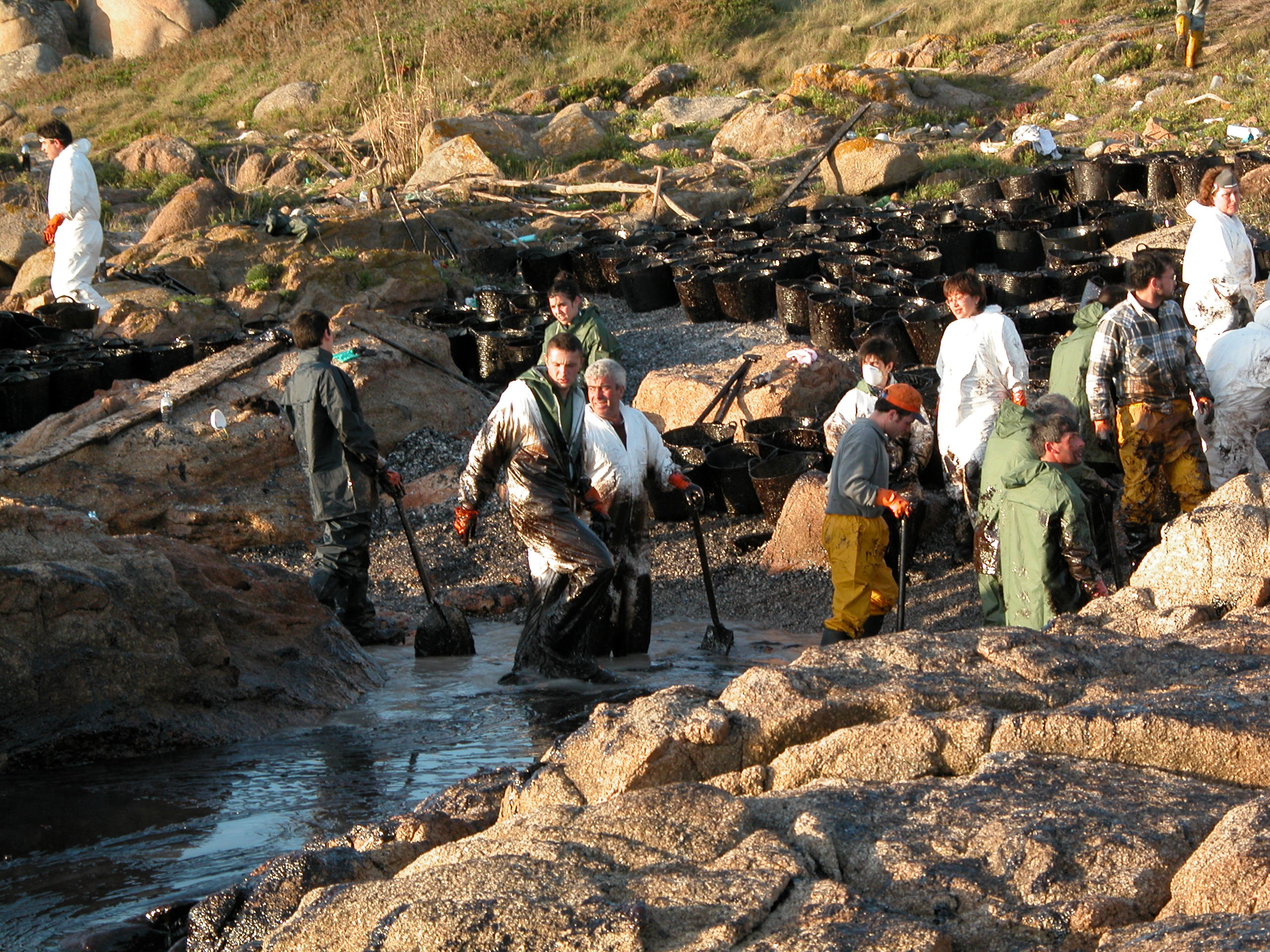 Limpeza da marea negra do Prestige na praia de San Vicente, O Grove.